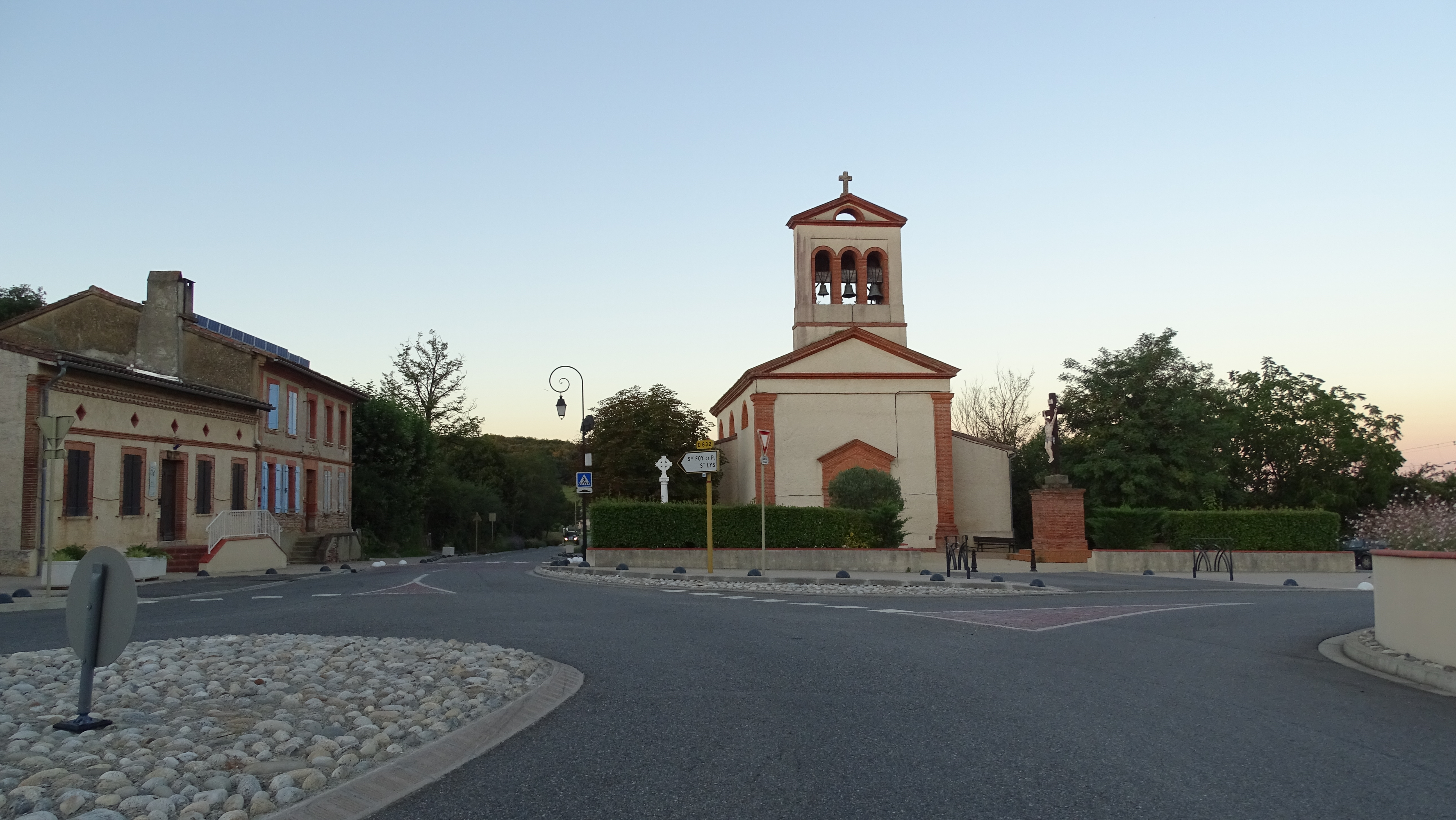 Église de Bragayrac (Haute-Garonne, France).